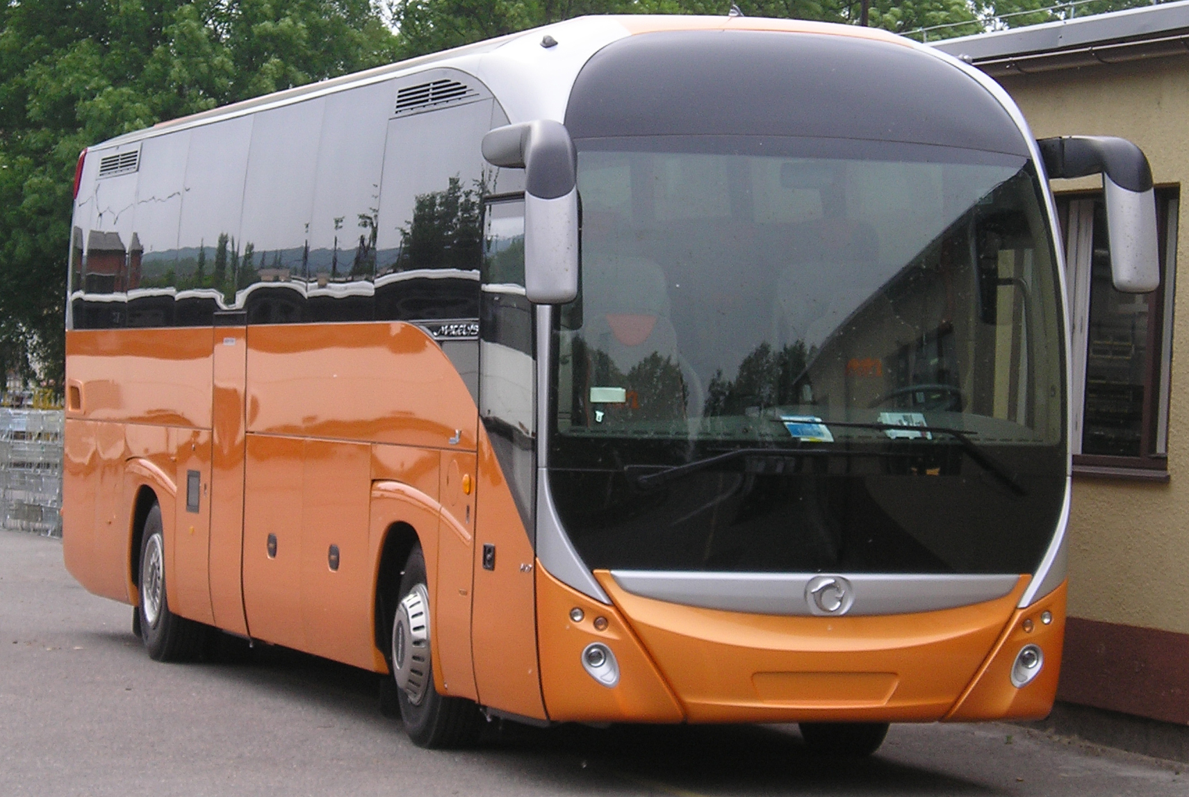 Irisbus Magelys v areálu Iveco Czech republic